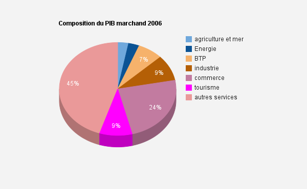 composition du PIB marchand polynésie française d'après ISPF